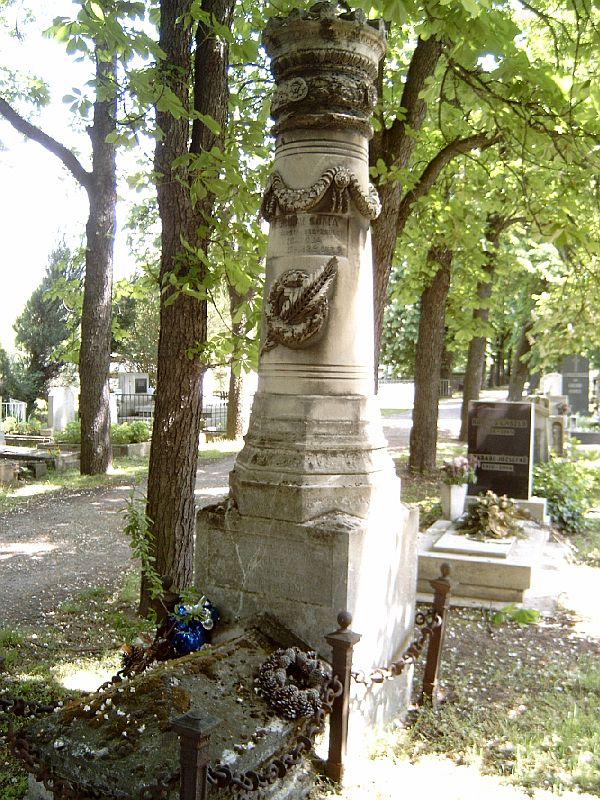 Mudrony Soma (Késmárk, 1841. nov. 27. – Kisszlatina, 1897. okt. 19.) közgazdasági író és politikus sírja Budapesten. Új köztemető: 32-körönd-1.